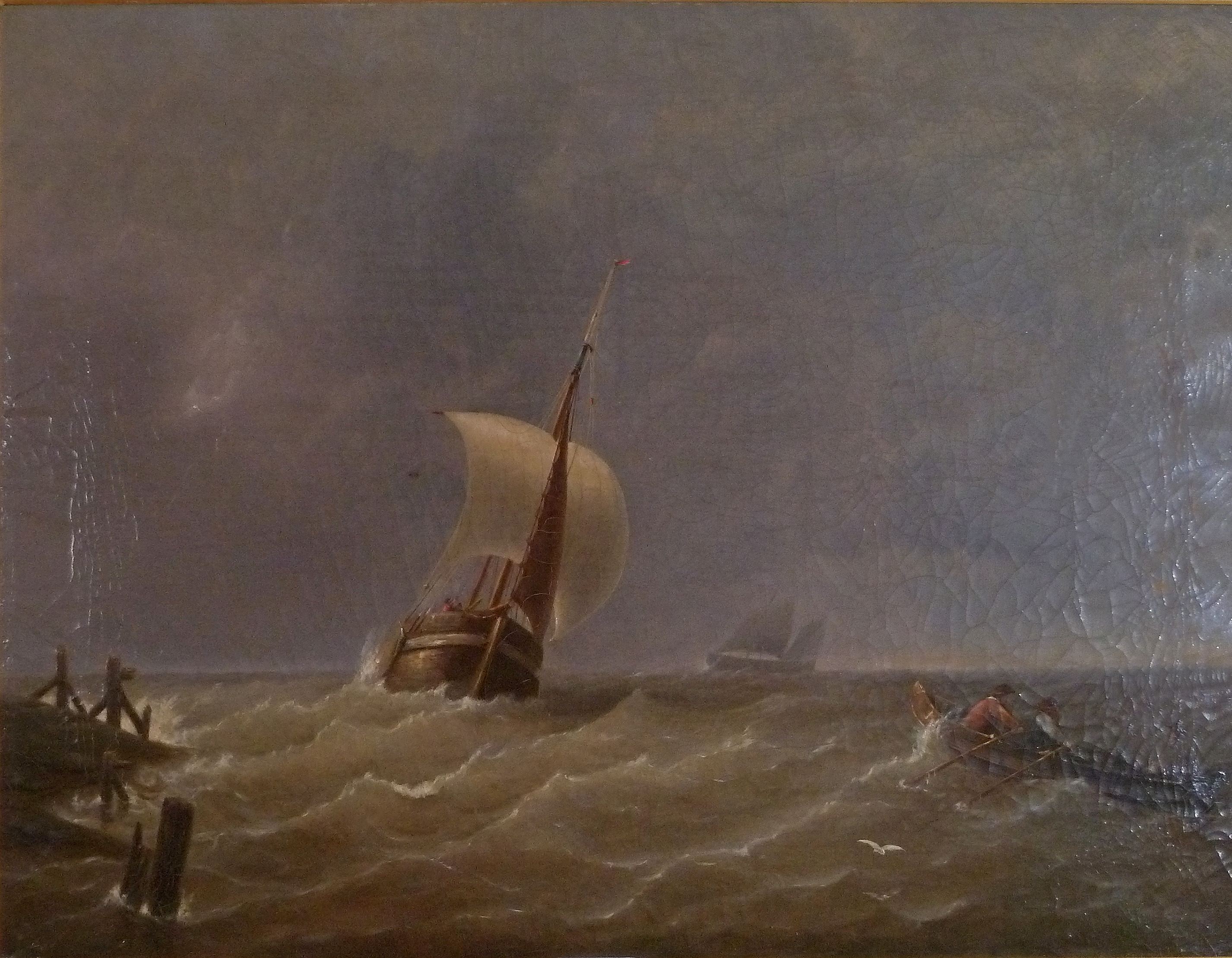 "Marine bij stormweer", olieverf op doek (70 x 97 cm) door de belgische kunstschilder Henri Lehon (1809-1872); privébezit